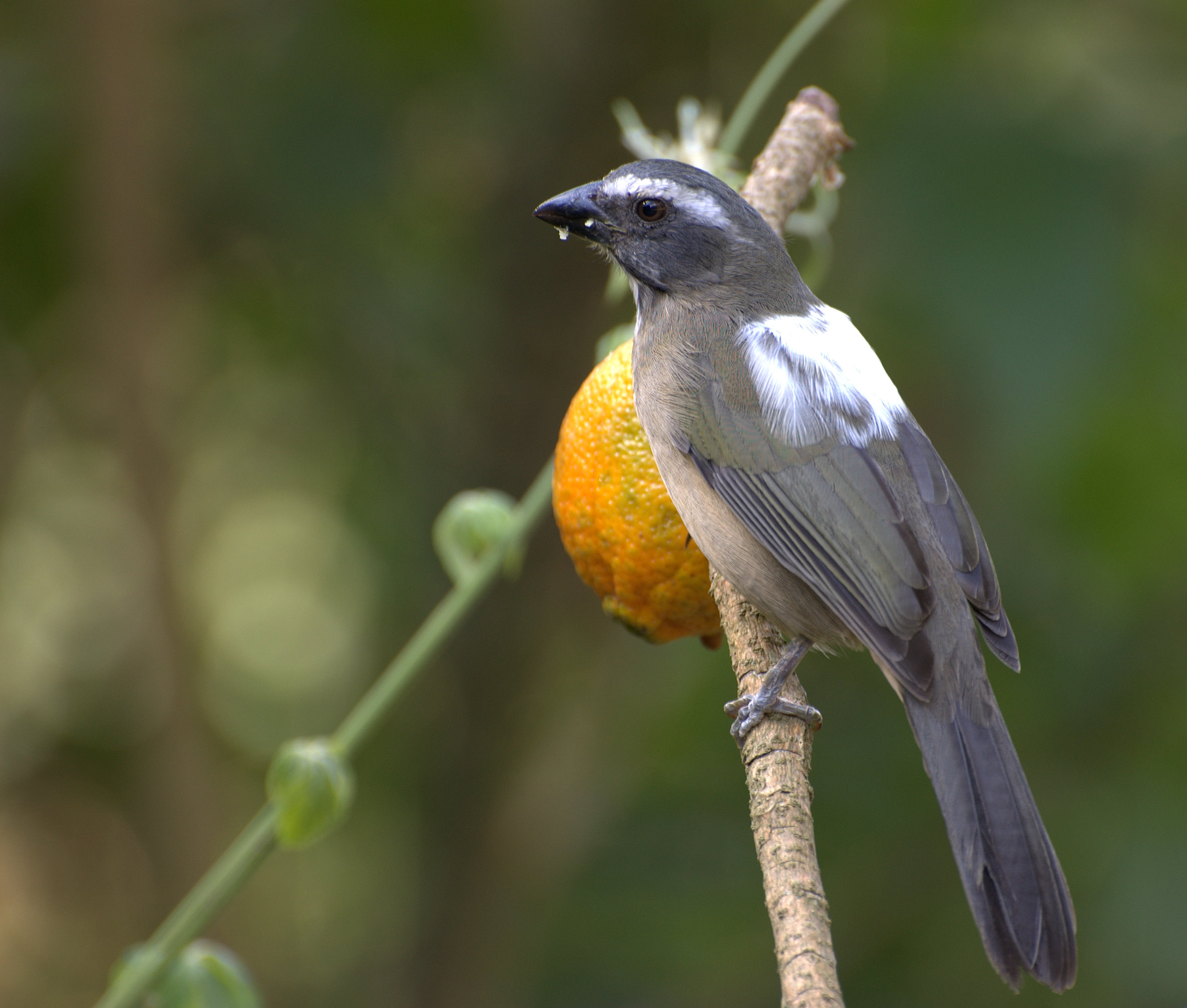 Horto Florestal de São Paulo Você sabia? O leucismo é uma ocorrência genética que deixa parte das penas brancas. O leucismo ocorre em vários animais, muitos deles considerados albinos na verdade são leucístiscos, um verdadeiro albino deve possuir os olhos rosas ou azul-claro. Ao contrário dos albinos, os indivíduos leucísticos apresentam uma resistência à luz solar ligeiramente maior, já que a refletem melhor. Apesar disso os indivíduos raramente sobrevivem por muito tempo, são facilmente avistados por predadores e pelas suas presas que acabam escapando. Quando chegam à idade adulta dificilmente irão se reproduzir porque é normal as fêmeas rejeitarem os leucísticos. Ouça o canto do Trinca-ferro-verdadeiro no site : Fonte: Museu de Zoologia João Moojen Universidade Federal de Viçosa